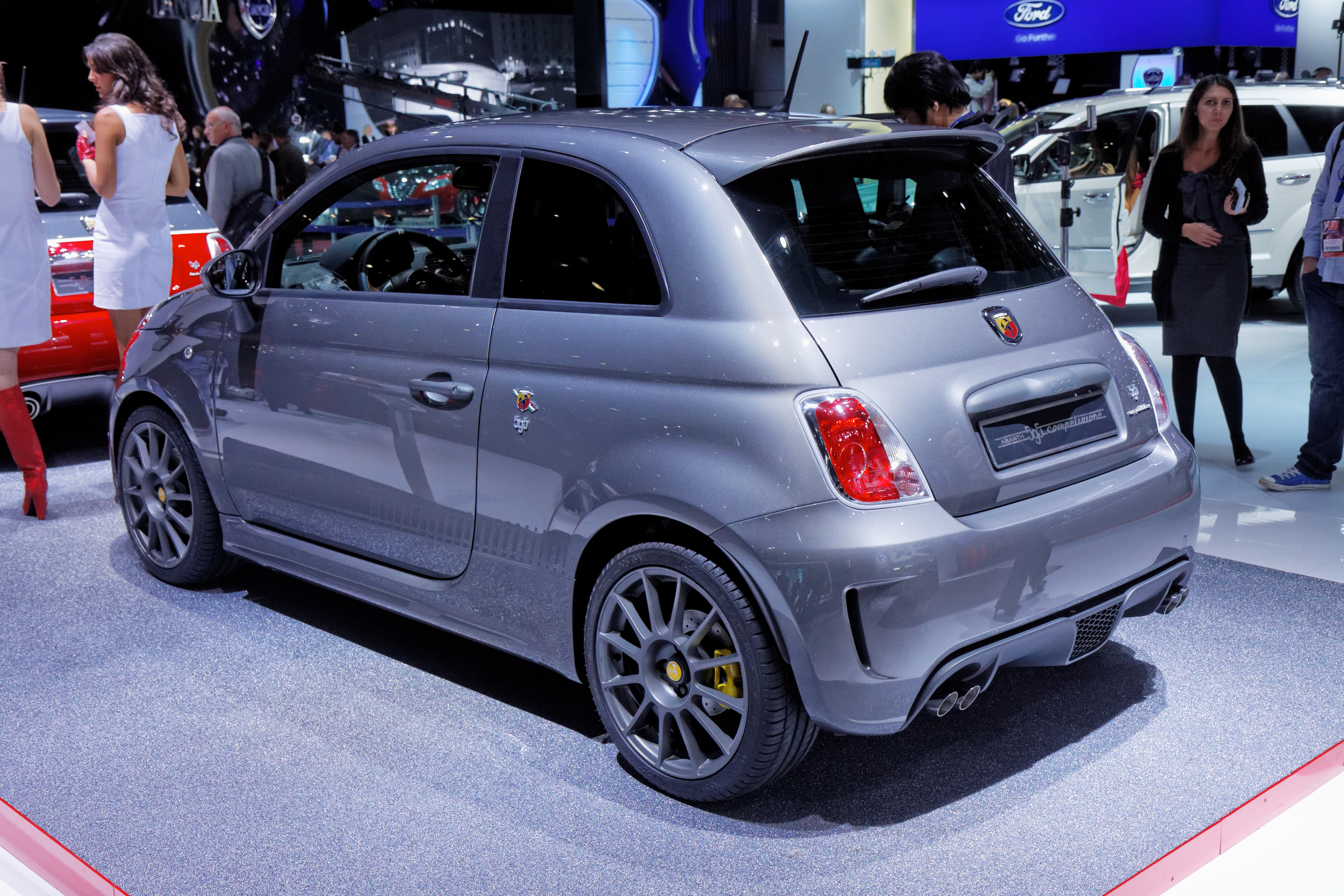 Une Fiat Abarth Competizione présentée lors du Mondial de l'Automobile de Paris 2012.